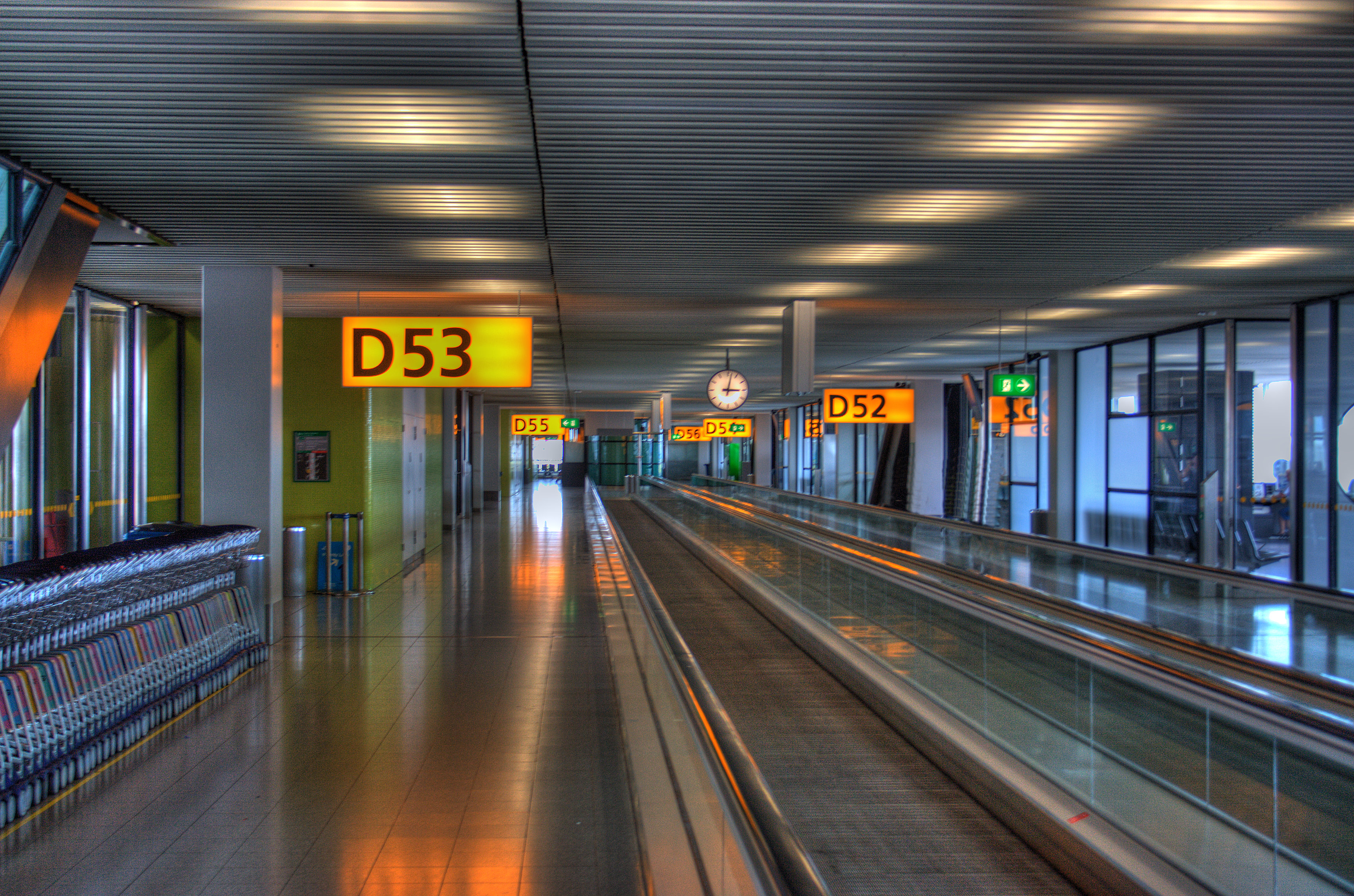 Aeropuerto de Schiphol (Amsterdam) donde se aprecian los elementos de señalización diseñados por Paul Mijksenaar